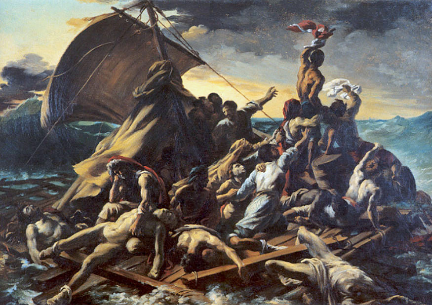 O NAUFRÁGIO DA MEDUSA, Cópia de original de Theodore Gericault. Óleo sobre papel colado em cartão - 35,9 x 52,5 cm